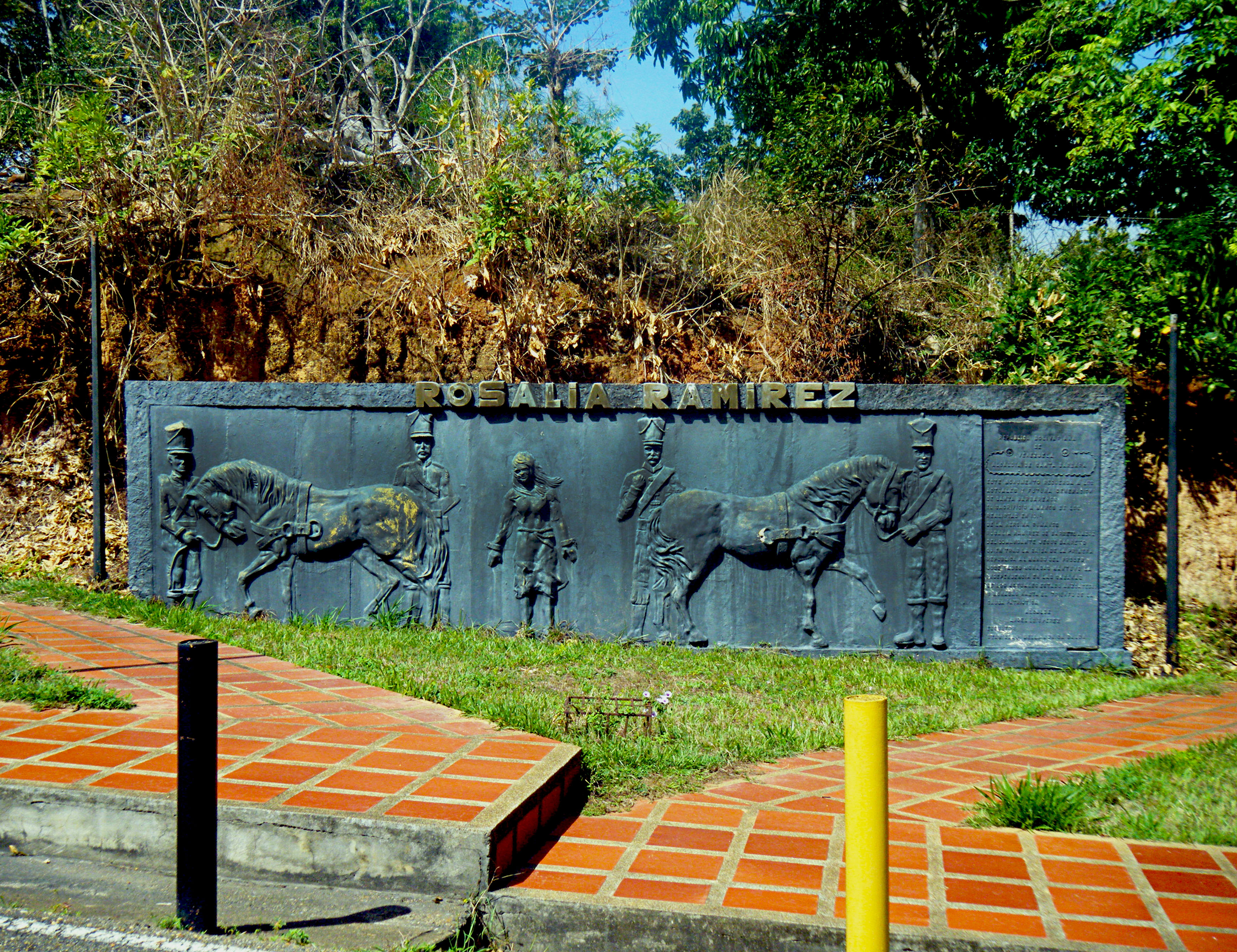 Monumento de Doña Rosalia Ramirez en Santa Barbara, Estado Monagas. Venezuela.